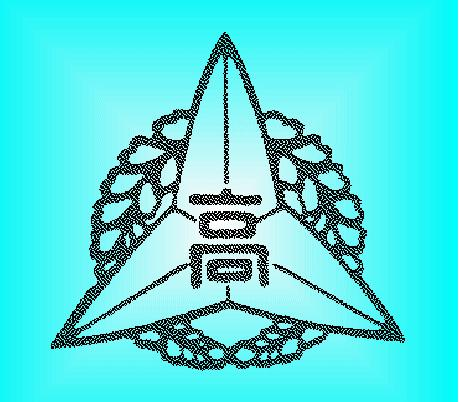 愛知県第三中学校三稜（知・仁・勇）と旧津島高女（下がり藤） がデザインされています。